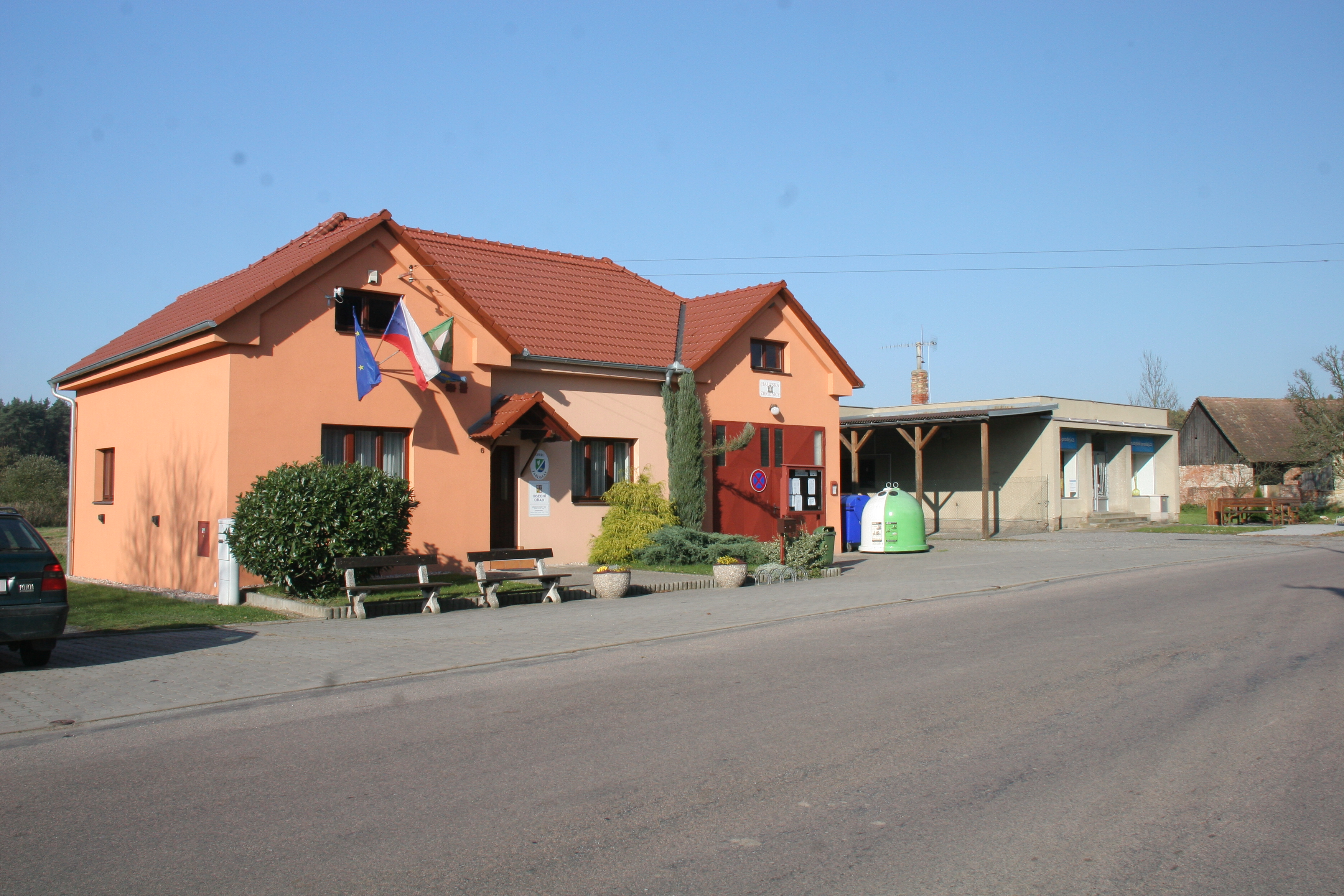 Jaroslav obecní úřad